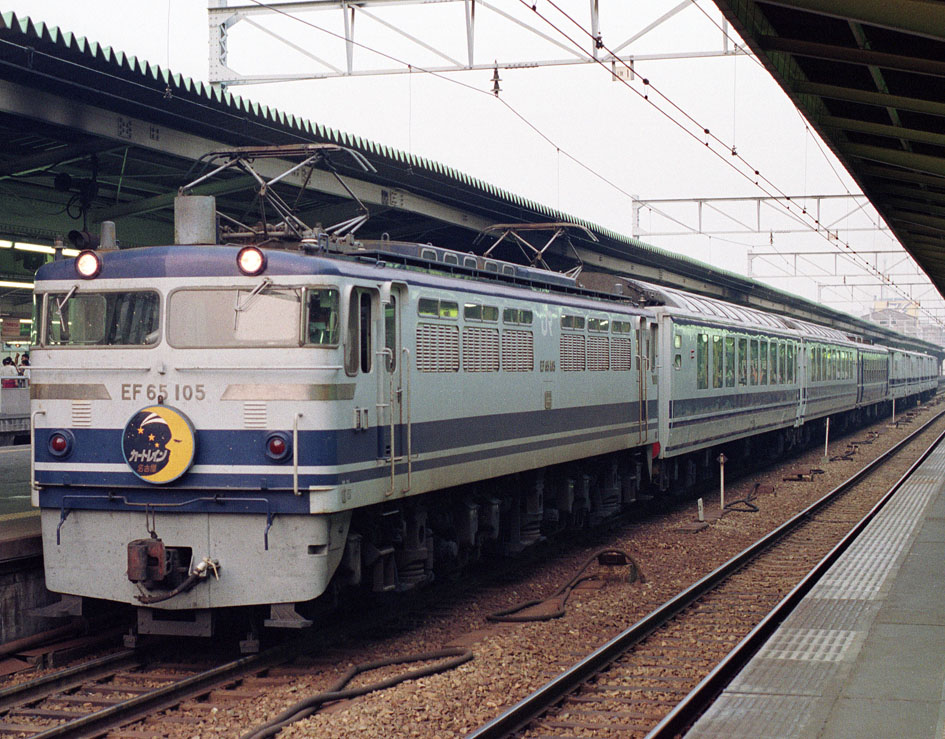 EF65 105けん引カートレイン名古屋